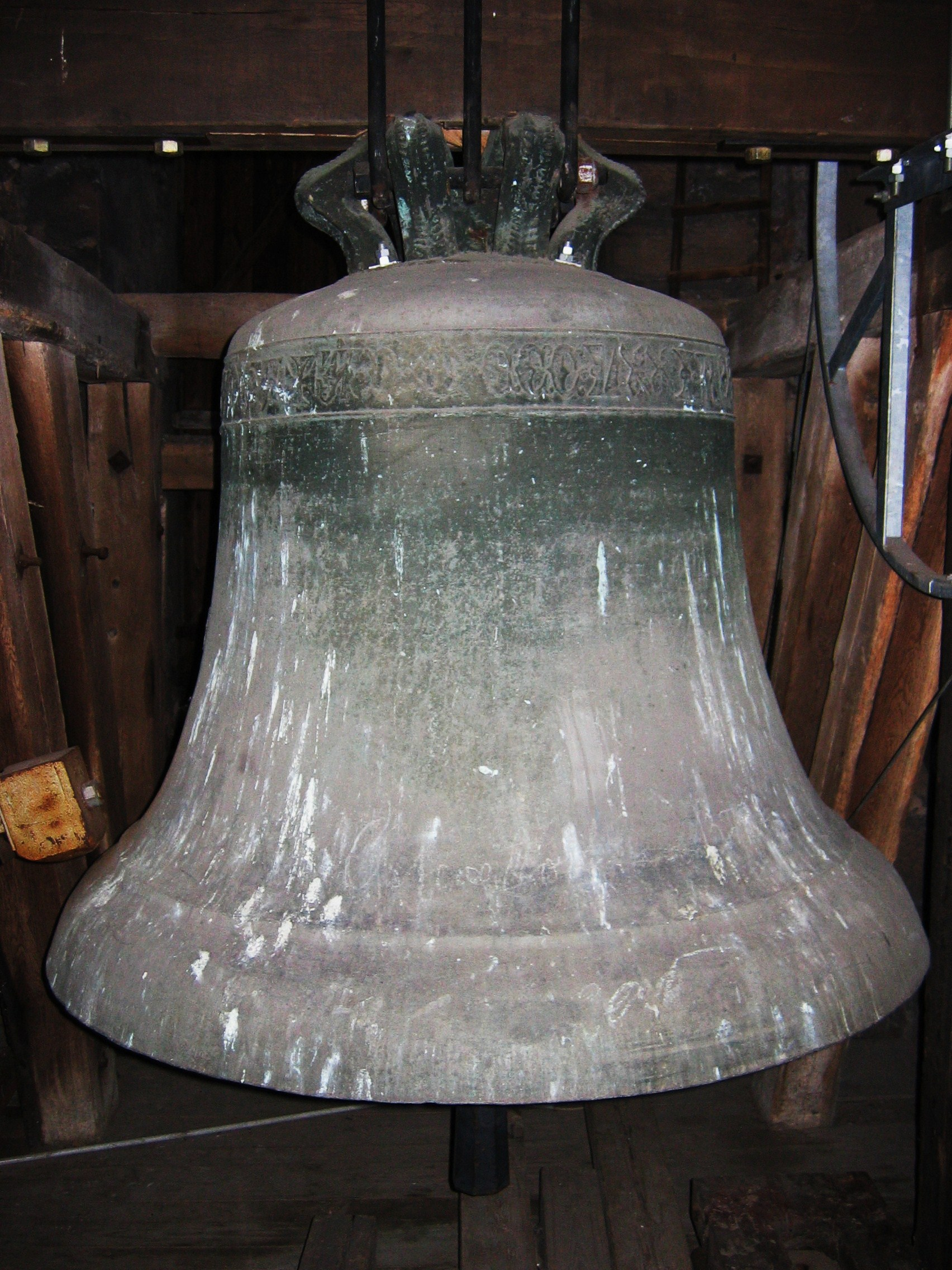 Osterglocke (Glocke 1, cis1) in der Bad Hersfelder Stadtkirche